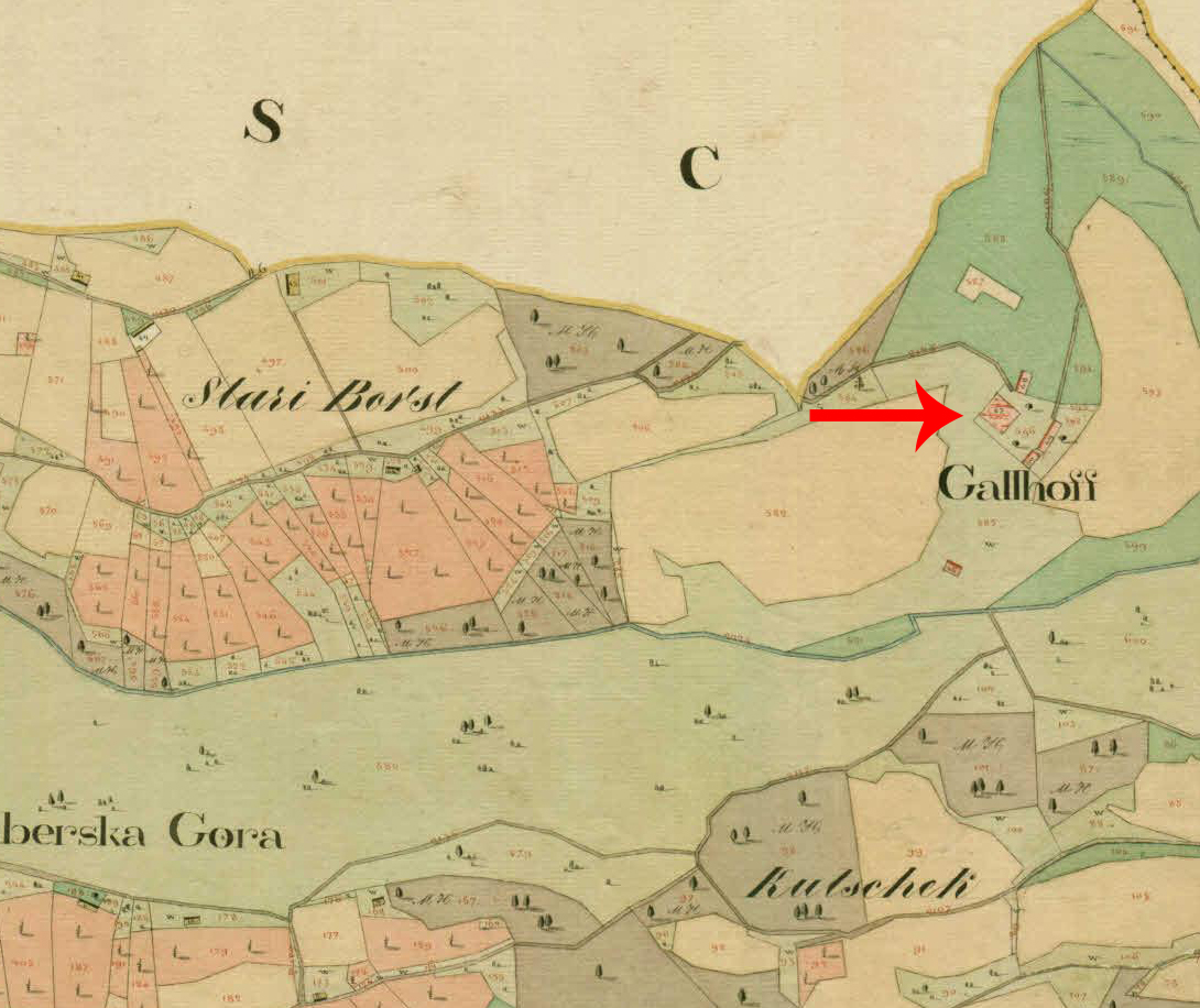 Franciscejski kataster za Kranjsko, 1823-1869